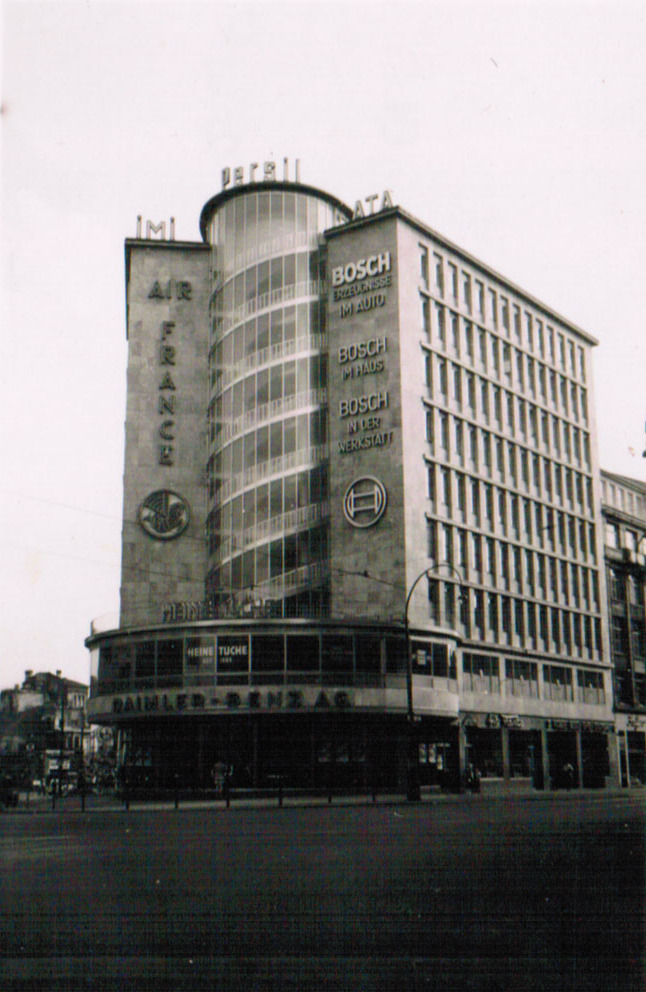 Das Junior-Haus in Frankfurt am Main, 1952